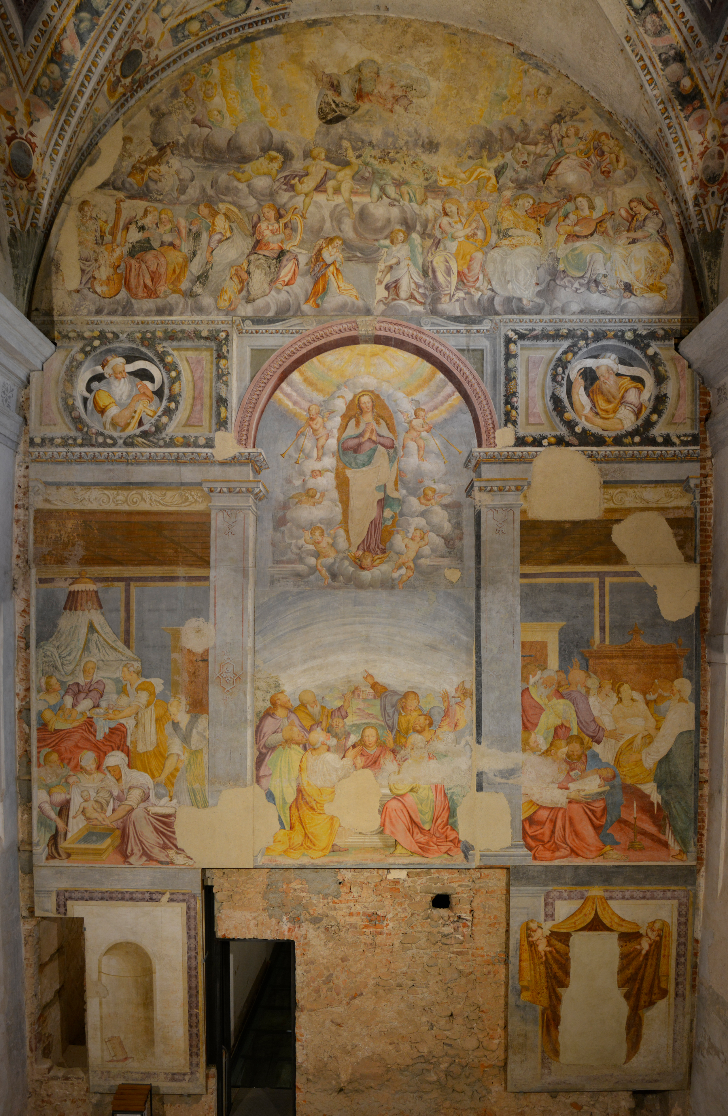 L'affresco Assunzione della Madonna nel monastero di Cairate, opera di Aurelio Luini.